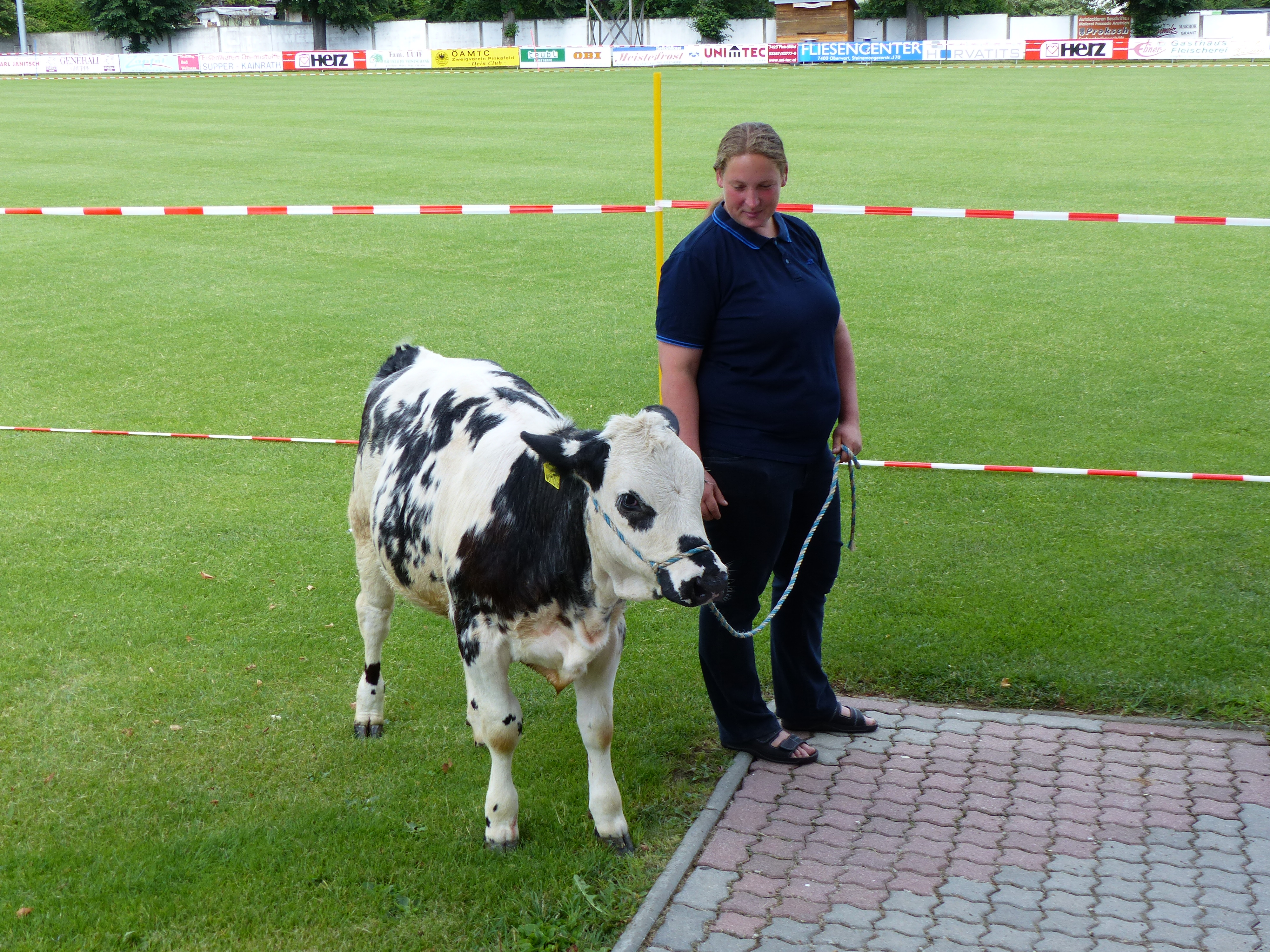 Die Kuh "Schnucki" mit Besitzerin Corinna Wagner-Luif beim Kuhfladenspiel des SC Pinkafeld